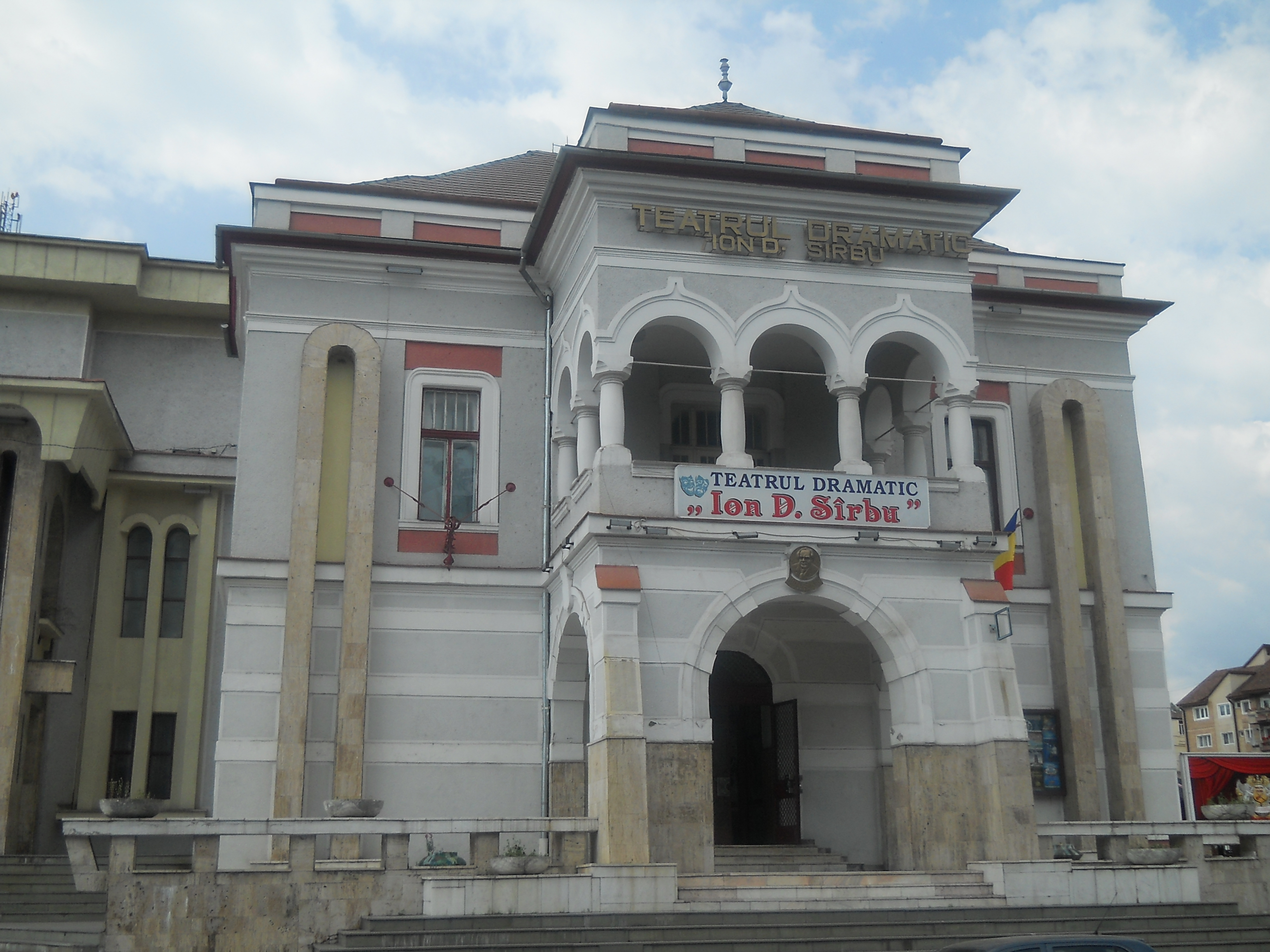 Teatrul Dramatic din Petroşani